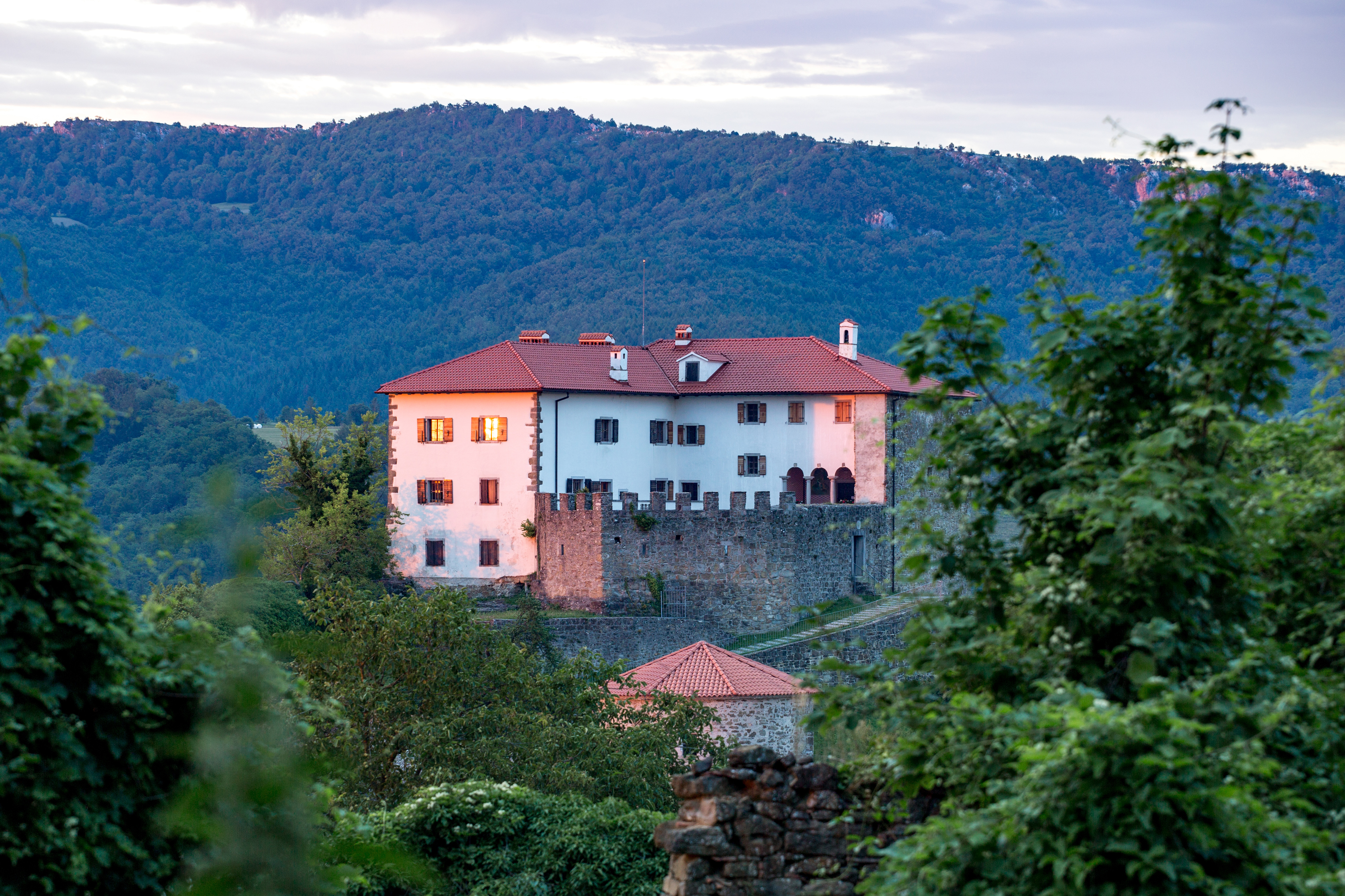 Grad Prem